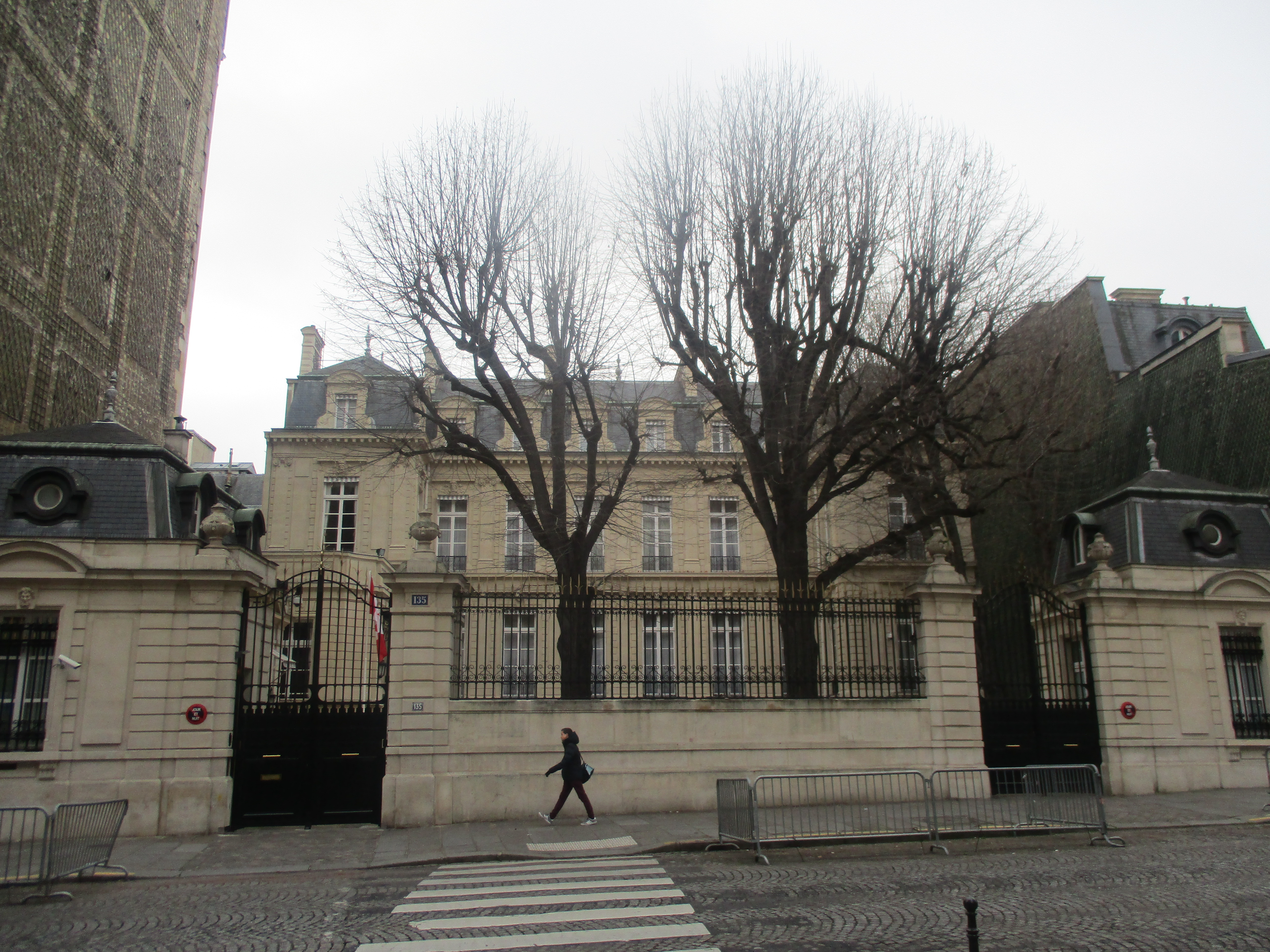 135 rue du Faubourg-Saint-Honoré, Paris VIIIe. Hôtel de Rigny: résidence de l'ambassadeur du Canada depuis 1950.